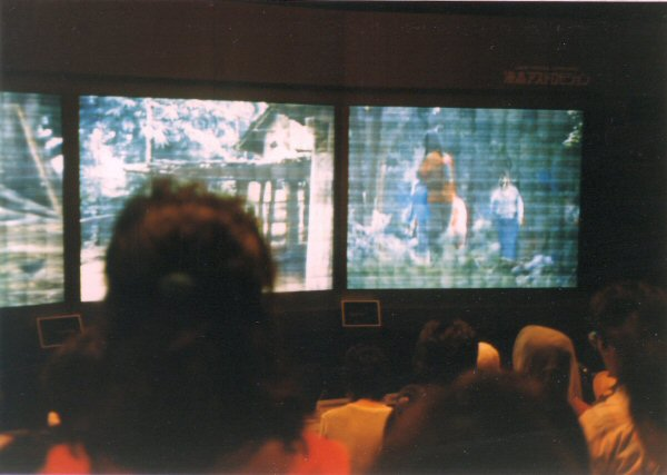 科学万博